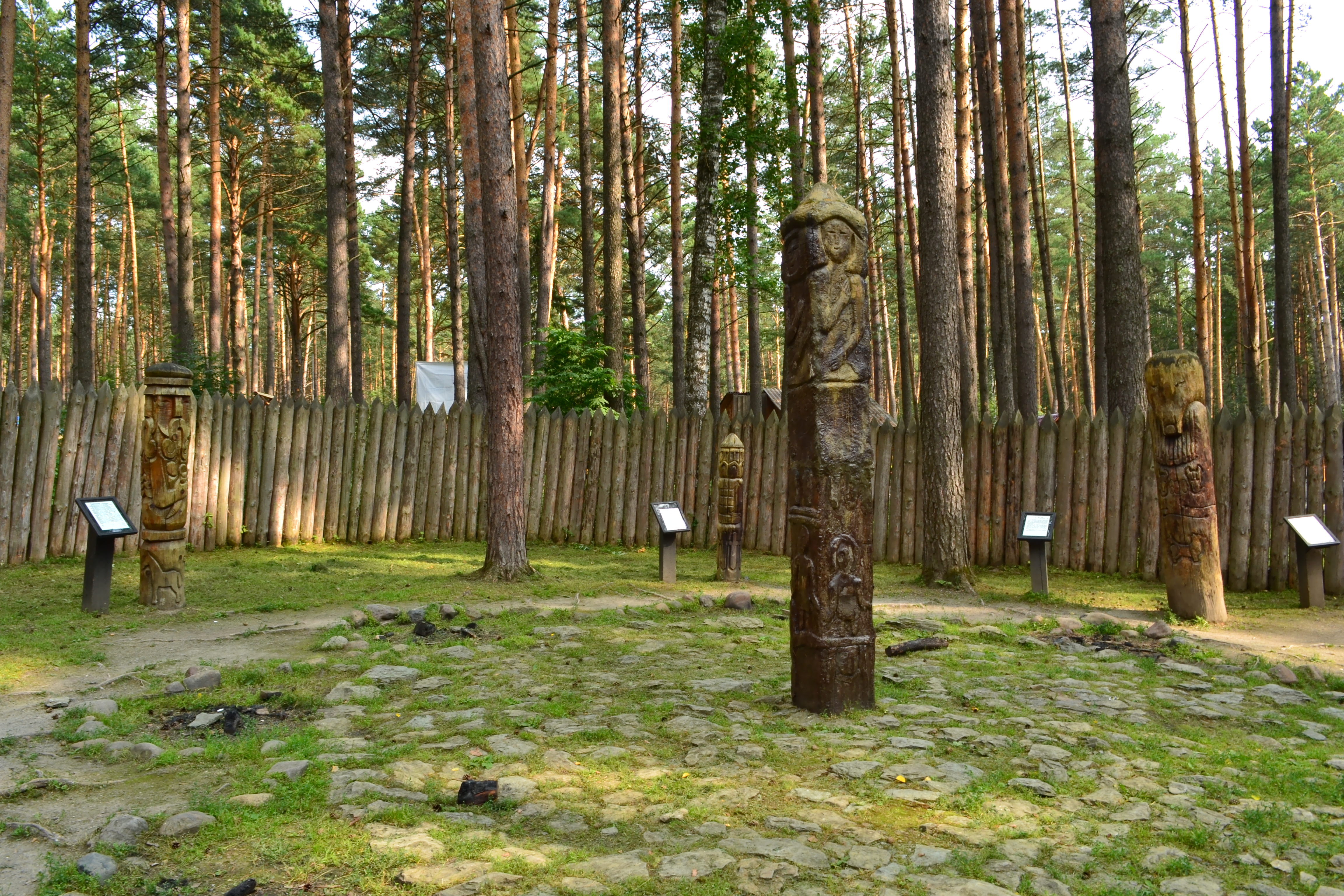 Писаный заказник, Кемеровский район This image is related to the protected area of Russia number 4210008